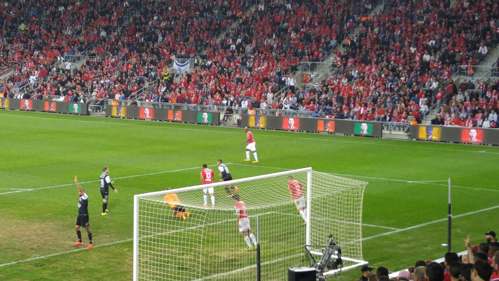 Hapoel Beer Sheva vs. Bnei Sakhnin F.C. in Beer Sheva's Terner stadium, march 7,2016 הפועל באר שבע במשחק מול בני סכנין, באיצטדיון טרנר בבאר שבע, בתאריך 7 במרץ 2016. המשחק הסתיים בתוצאה 2-2.